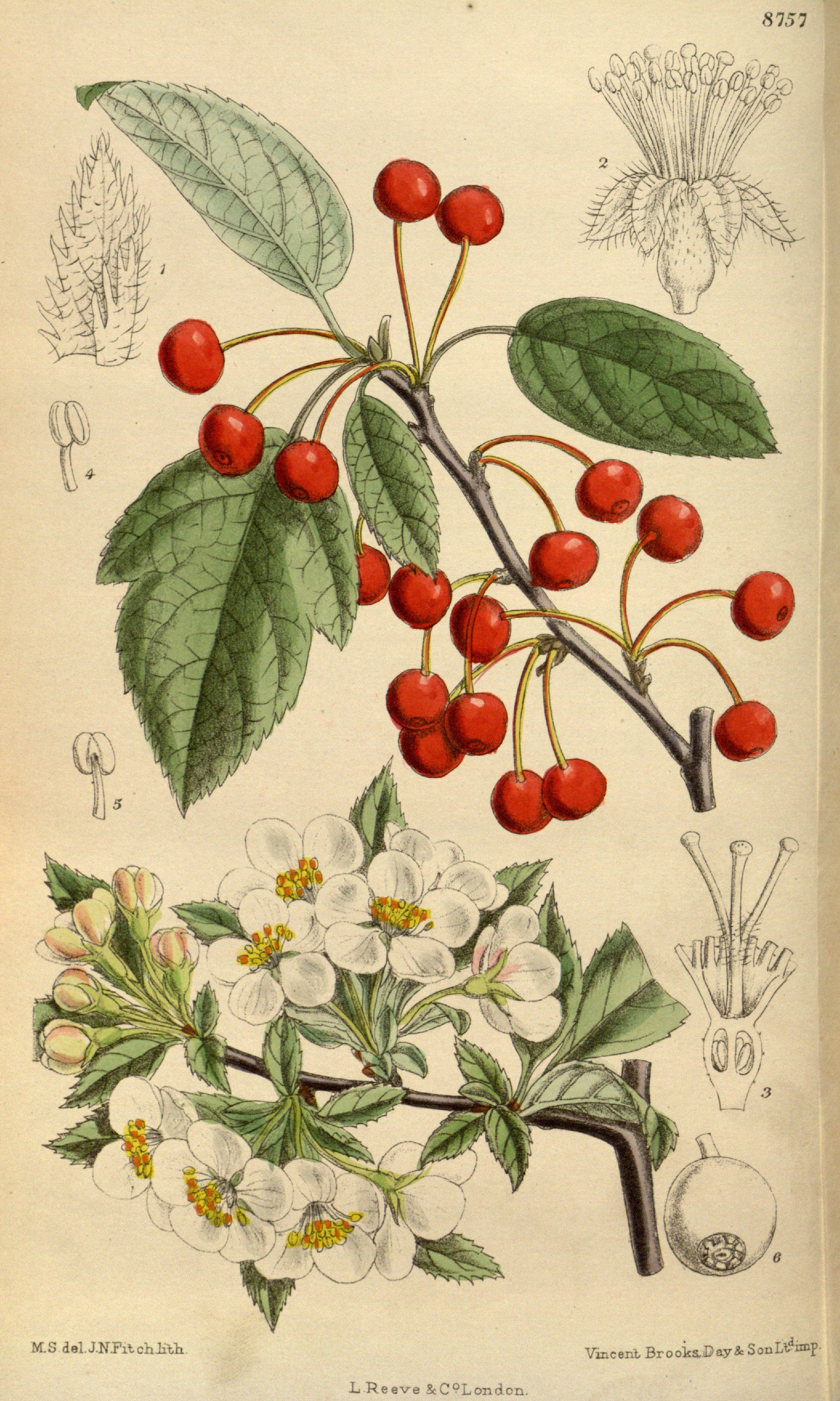 Malus sargentii, Rosaceae